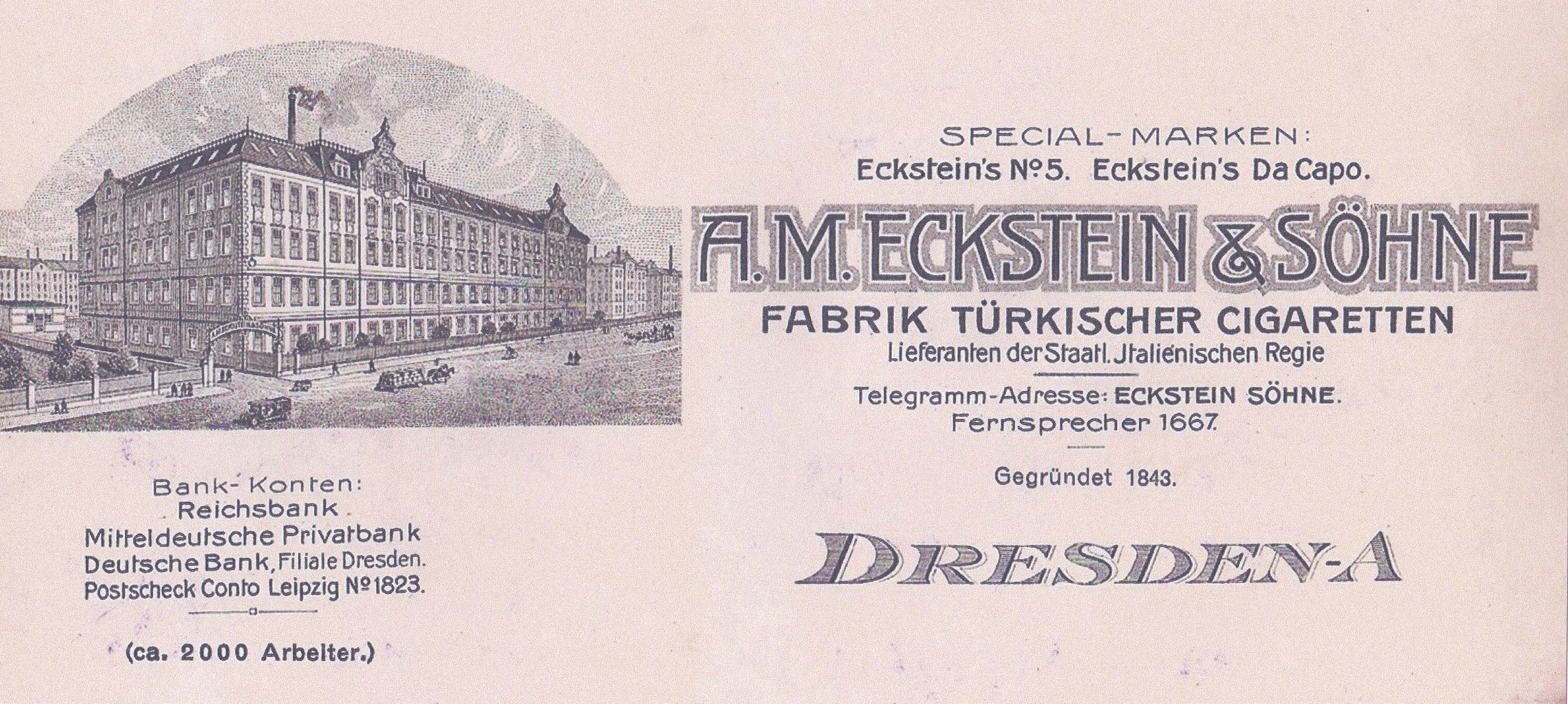 Zigarettenfabrik A. M. Eckstein & Söhne - Fabrik türkischer Zigaretten in Dresden A 27, Bamberger Str. 4-8 (Ansichtskarte um 1912)